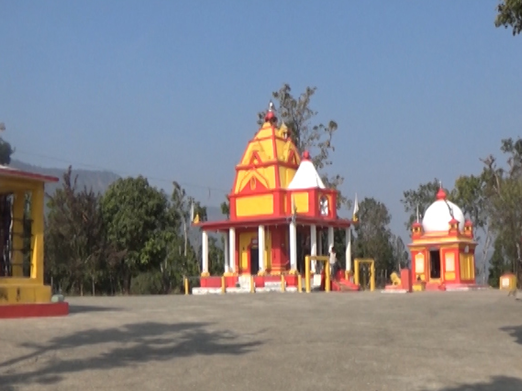 नेपाली: छाया क्षेत्रमा अवस्थीत छत्रेश्वरीदेवी मन्दिर